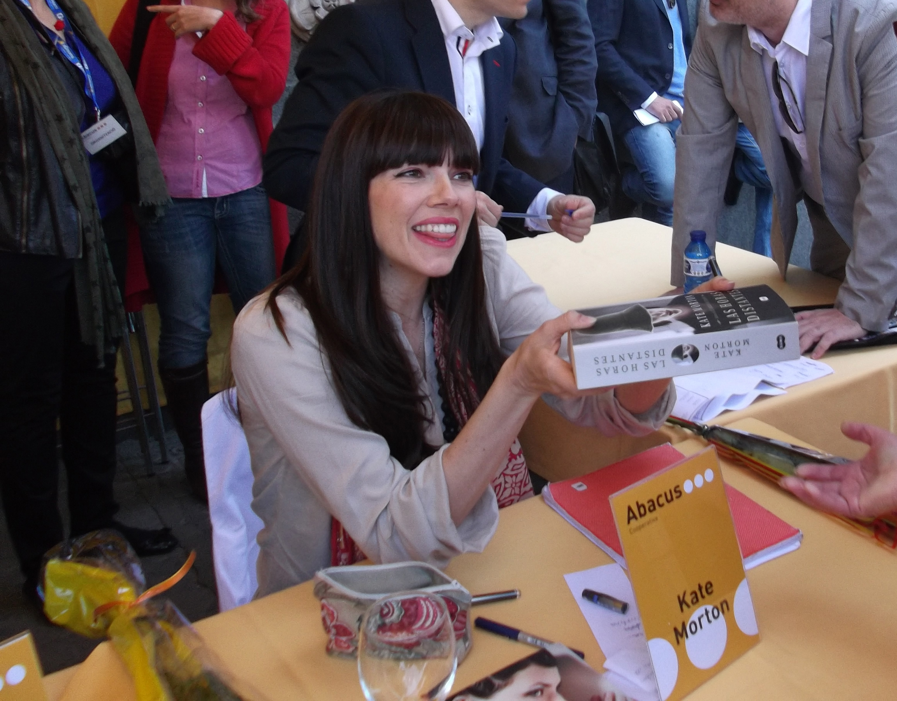 Kate Morton firmando libros el Día de San Jordi, Barcelona (La fotografía está hecha el 23.04.2013)